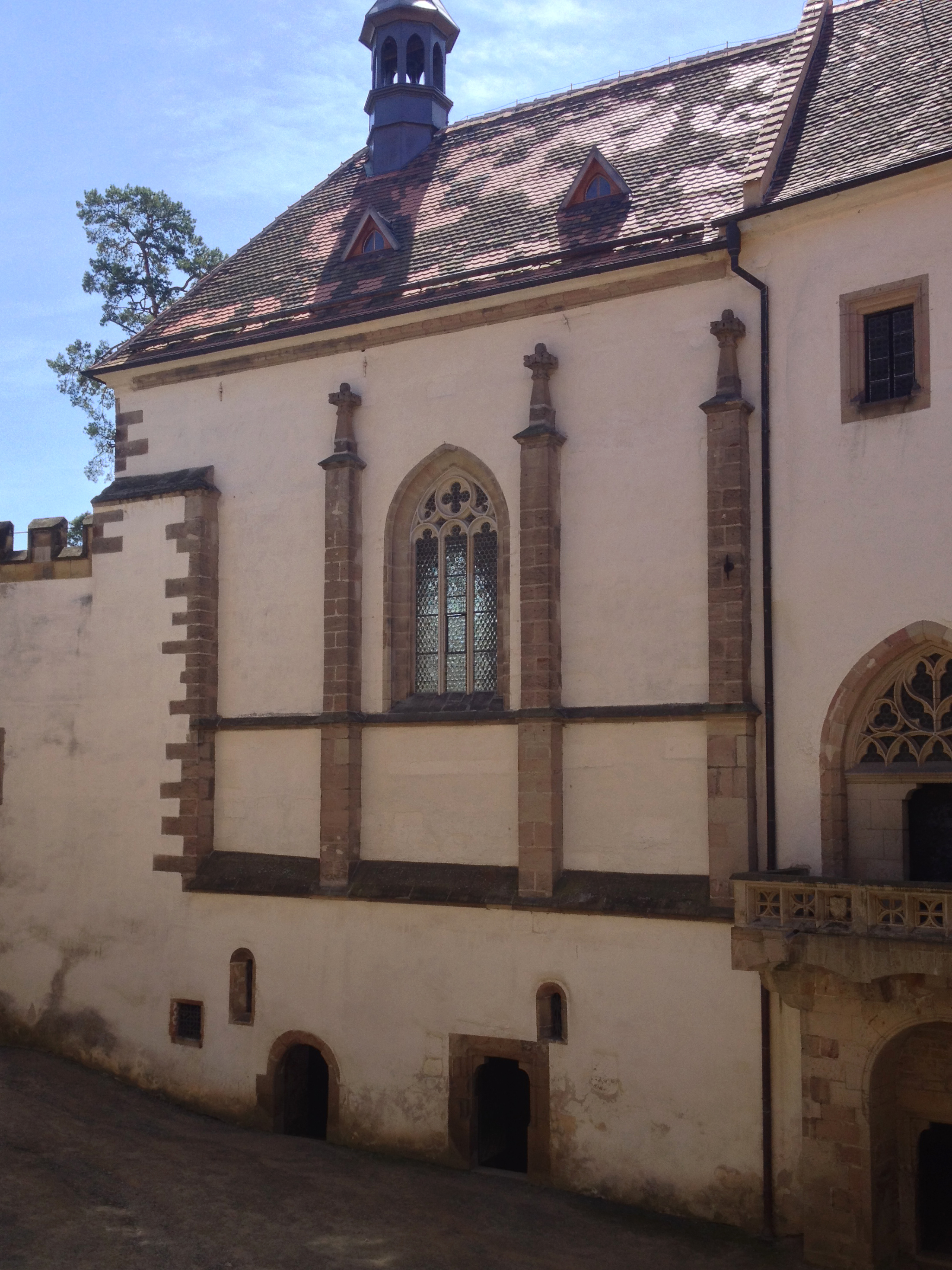 Kaple Korunování Panny Marie - severní strana